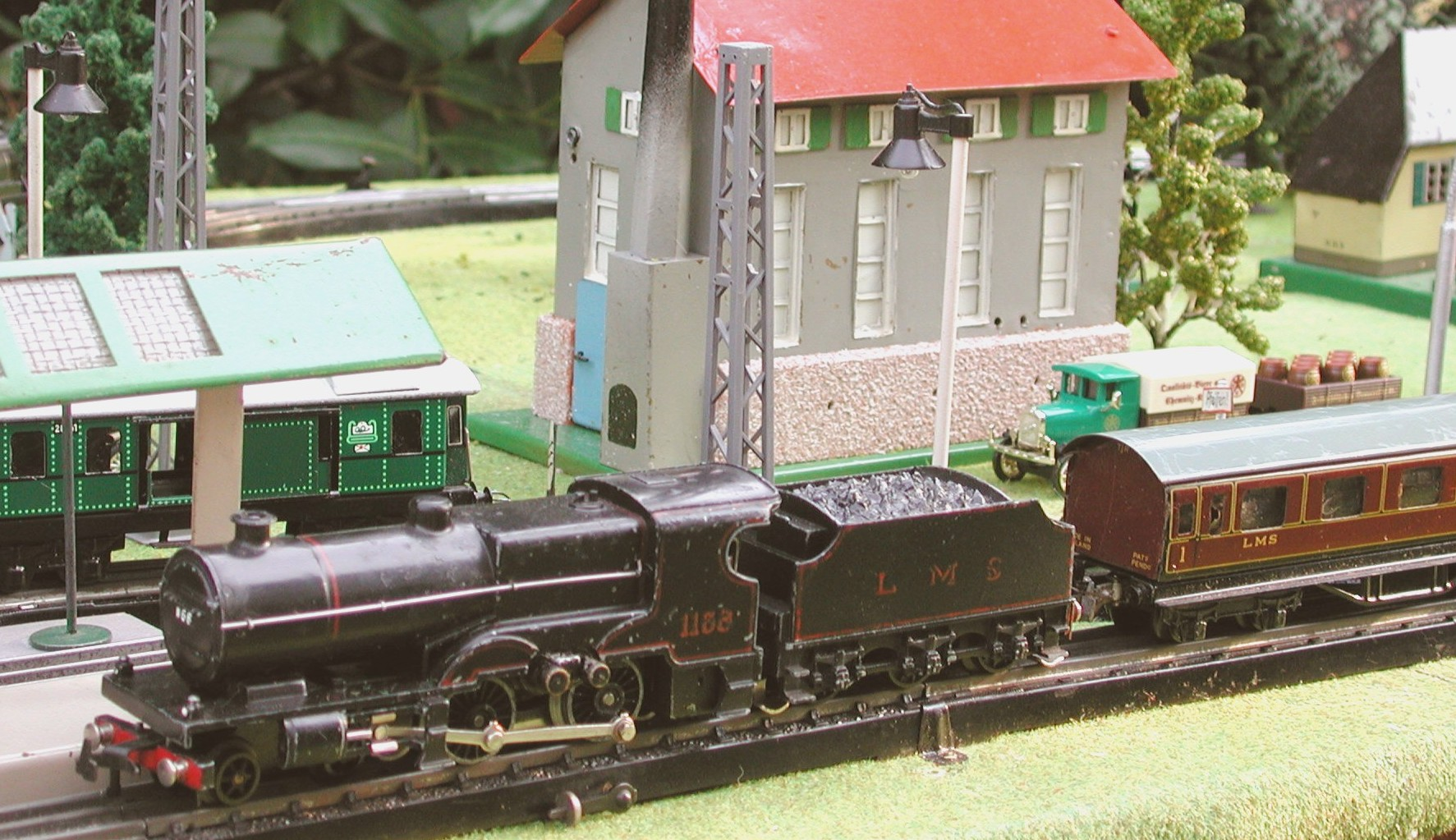 Trix Twin Railway (TTR) Lok 4-4-0 Compound AC, Baujahr ca. 1950. Das Modell war insbesondere bei der Trix-Gemeinde in England sehr beliebt und kam dort sowohl in der Ausführung der LMS (London, Midland and Scottish Railway) als auch für die BR (British Railways) auf den Markt. In Deutschland war die Compound nicht erhältlich. Das Foto zeigt die LMS-Ausführung mit Wechselstrommotor und nach außen stehenden Bürsten. Das Vorbild dieser Lokomotive stammte von der ehemaligen Midland Railway. Die ersten Exemplare wurden im Jahre 1902 gebaut. Der Verbundantrieb (Smith Compound) bestand aus einem innen liegenden Hochdruckzylinder und zwei außen liegenden Niederdruckzylindern. Die im Trix-Modell dargestellte Variante wurde ab 1914 in Dienst gestellt und ab 1924 von der LMS auf insgesamt 240 Exemplare erweitert. Die letzte Compound wurde 1961 aus dem Verkehr gezogen. Eine Maschine (Nr. 1000) bleibt der Nachwelt erhalten.